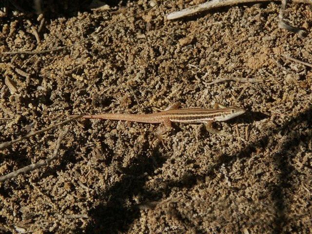 Pedioplanis namaquensis